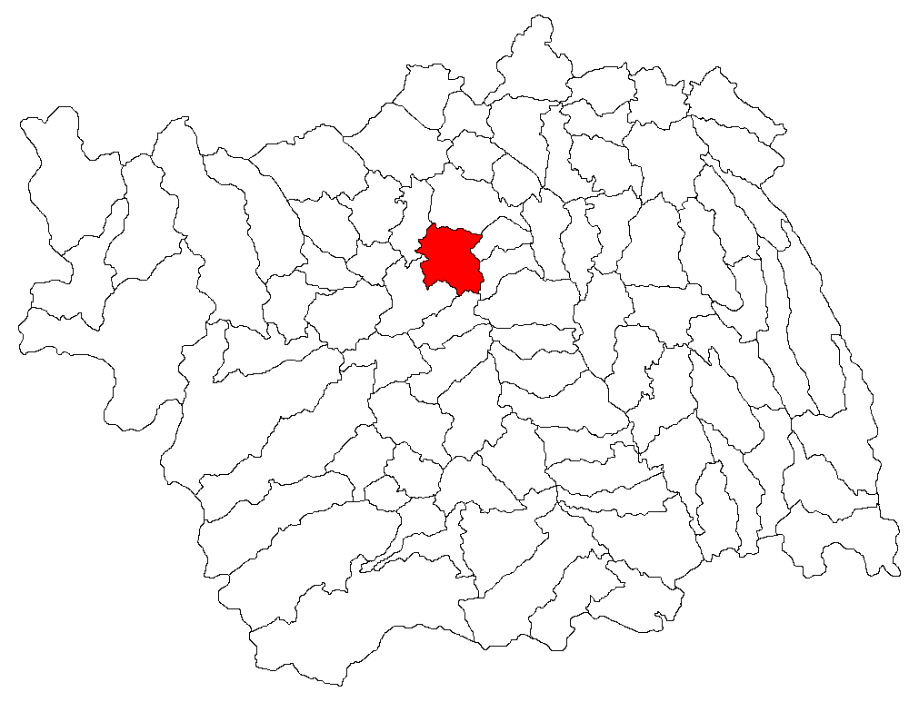 Categorie:Hărţi ale judeţului Bacău